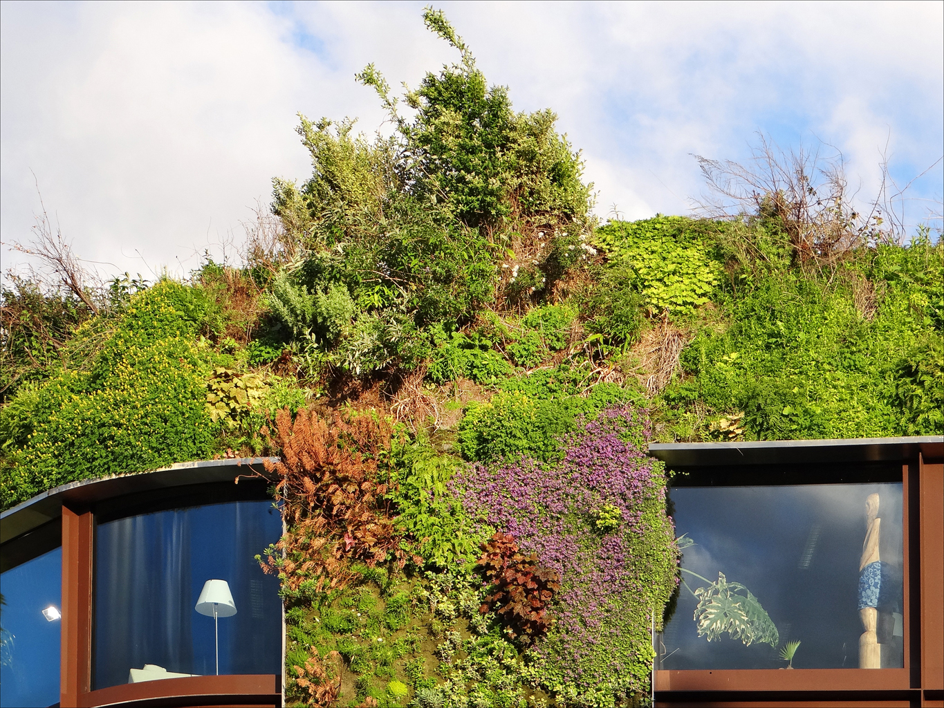 L'extrémité supérieure du mur végétal au crépuscule Patrick Blanc, chercheur au CNRS, botaniste et spécialiste des plantes tropicales, est l'inventeur des murs végétaux. Il a breveté un procédé qui lui offre la possibilité de végétaliser des surfaces urbaines jusqu’alors inaccessibles aux plantes. Pour l’instant ce traitement n’est appliqué qu’à un certain nombre d’immeubles de luxe, au Japon, en Thaïlande, aux Emirats Arabes et à une des façades du musée du Quai Branly à Paris. Le bâtiment du musée du quai Branly a été conçu par l’architecte Jean Nouvel.